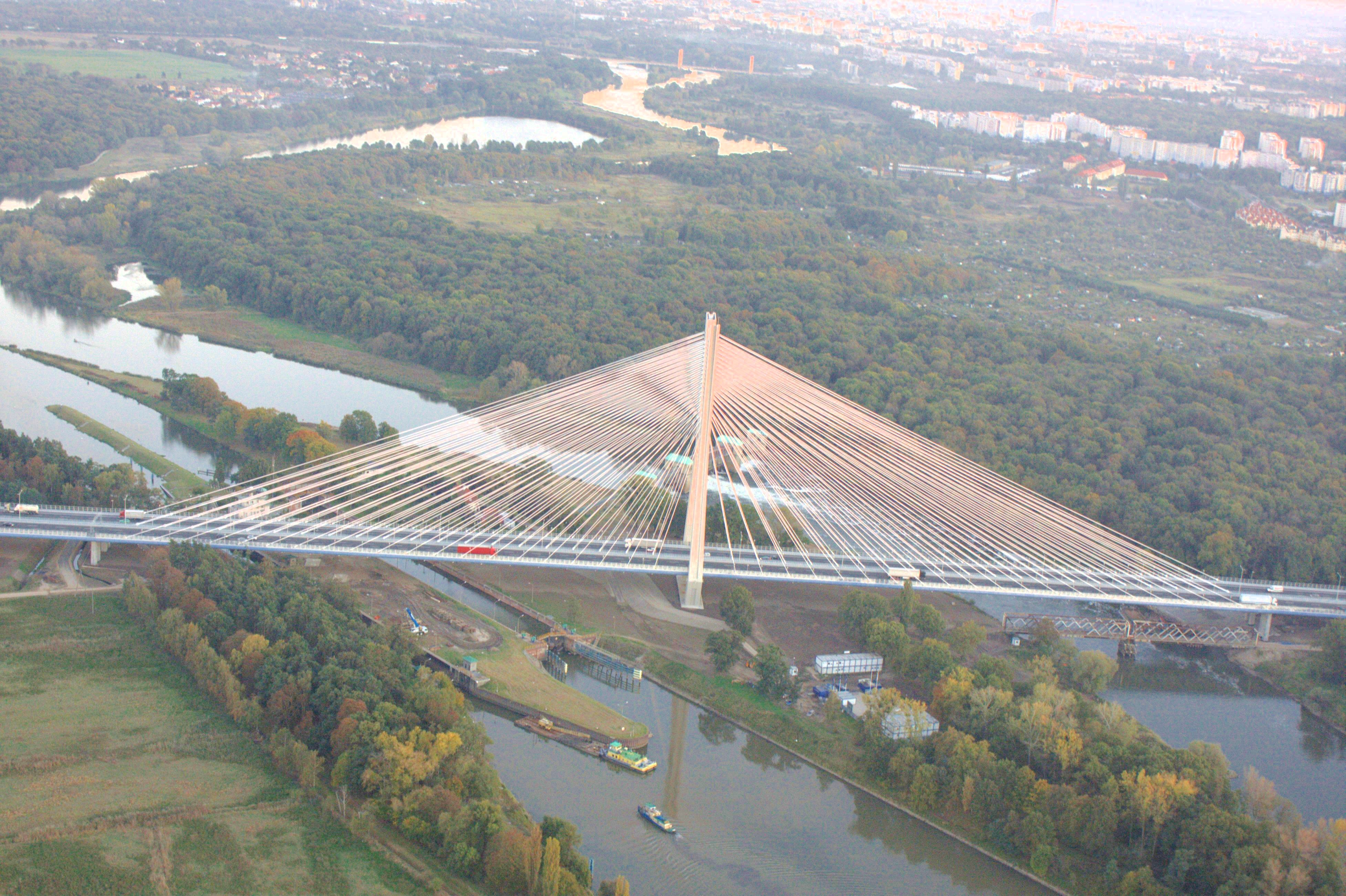 Rędziński Bridge